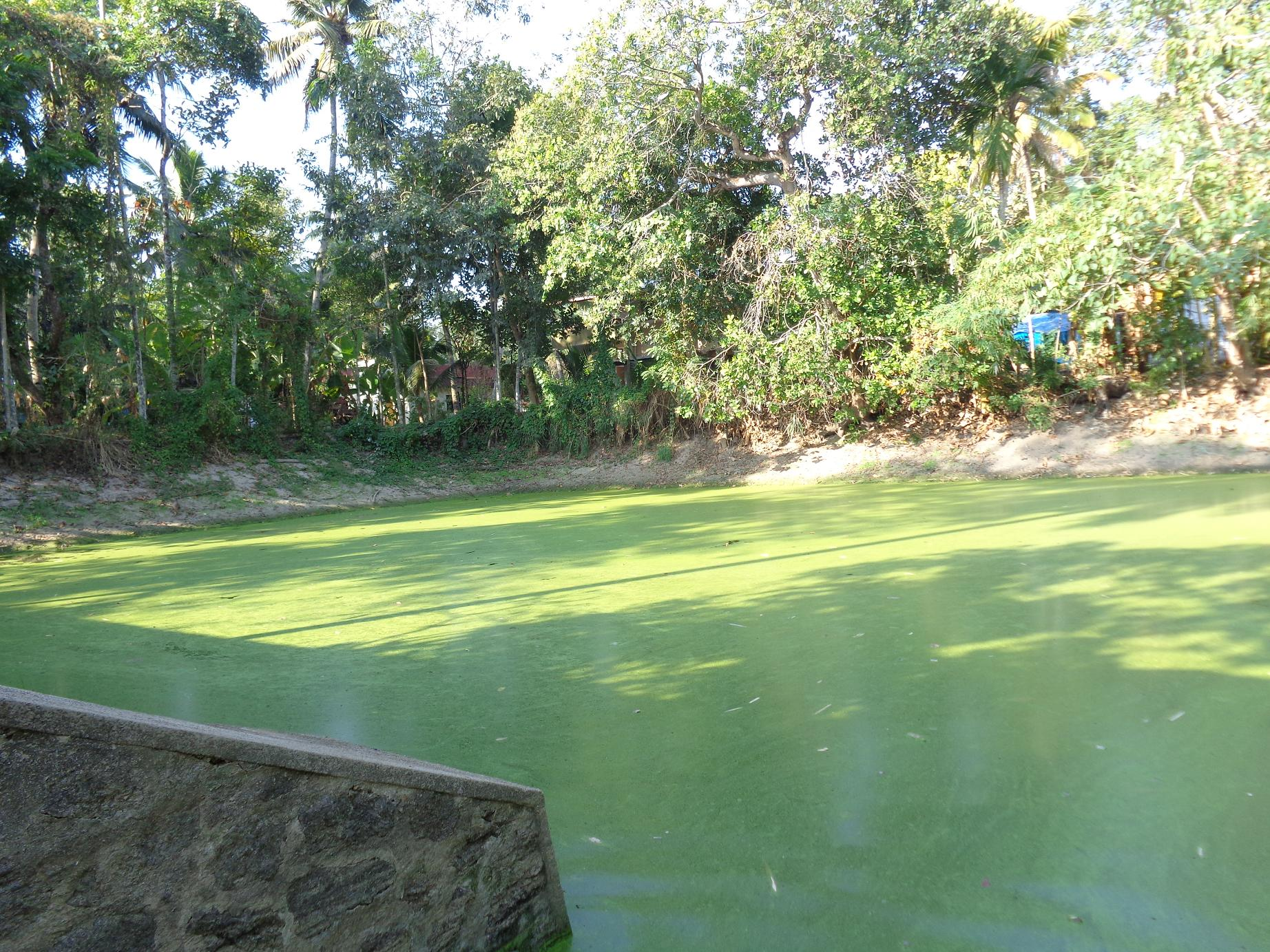 kattanam bharanikavu bhadrakali temple -pond